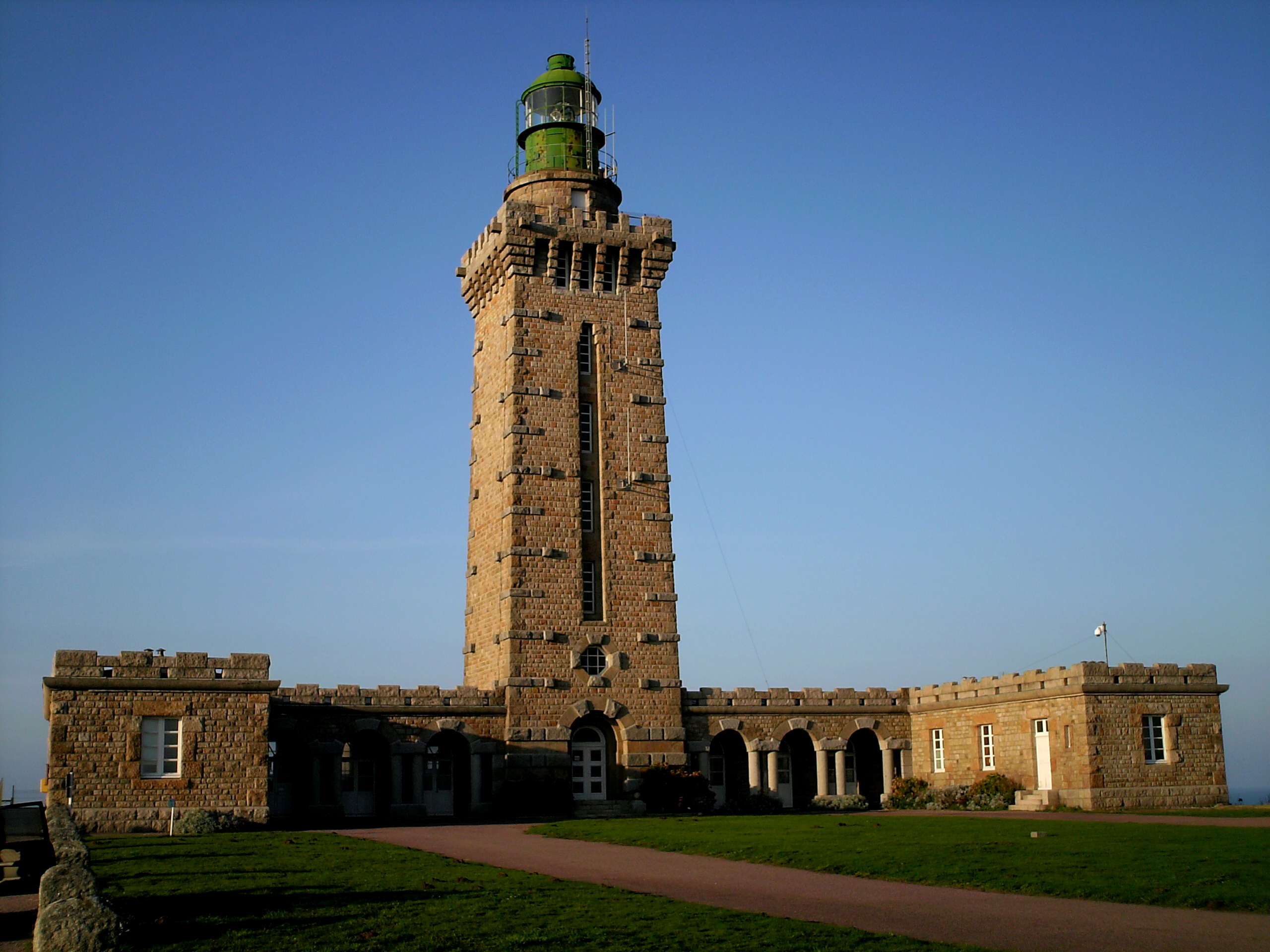 Cap Fréhel